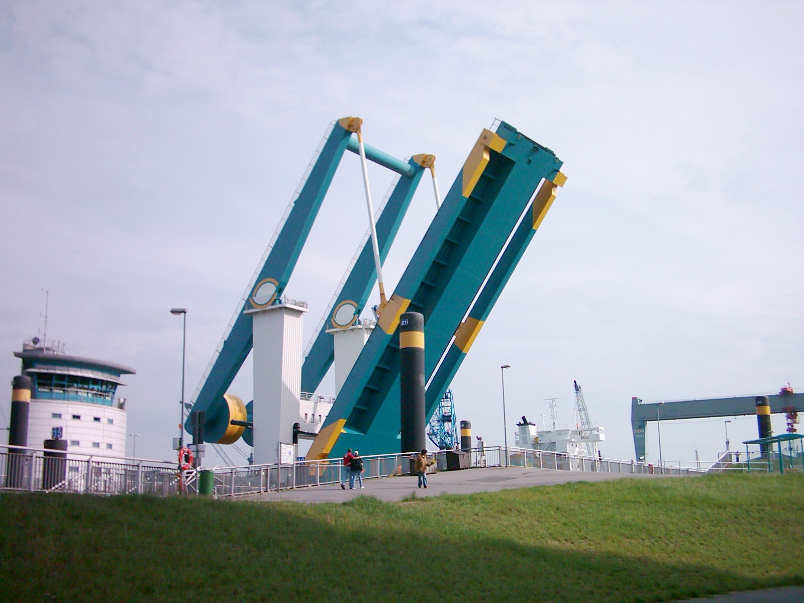 Die Klappbrücke des Este-Sperrwerks in Hamburg-Neuenfelde.